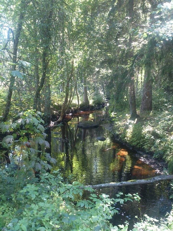 Höbringi oja hilissuvel